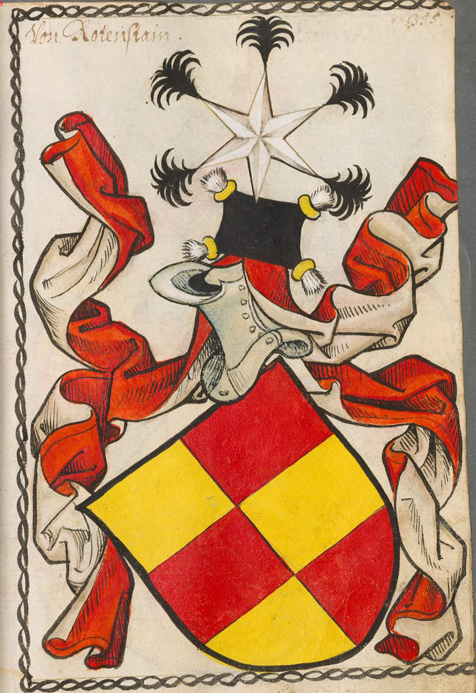 Scheibler'sches Wappenbuch , älterer Teil; Seite 355 Von Rotenstain (Rheinlander)